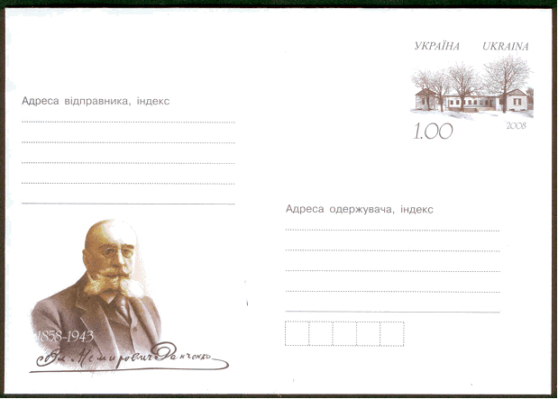 Хуожественный почтовый конверт с оригинальной маркой «Владимир Немирович-Данченко (1858-1943)». «УКРАЇНА UKRAINA 2008». Номинал марки – 1,00 грн.